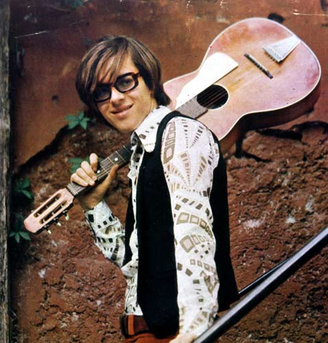 Il cantautore italiano Claudio Baglioni intorno alla fine degli anni 60 del XX secolo.